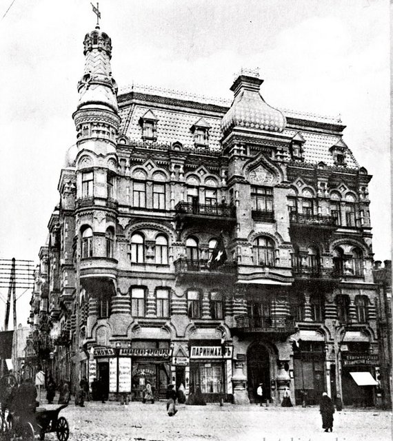 Караваевская площадь в Киеве. Фонтан.